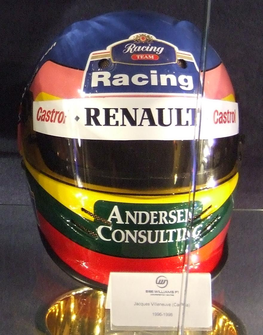 Jacques Villeneuve's helmet as a Williams driver.